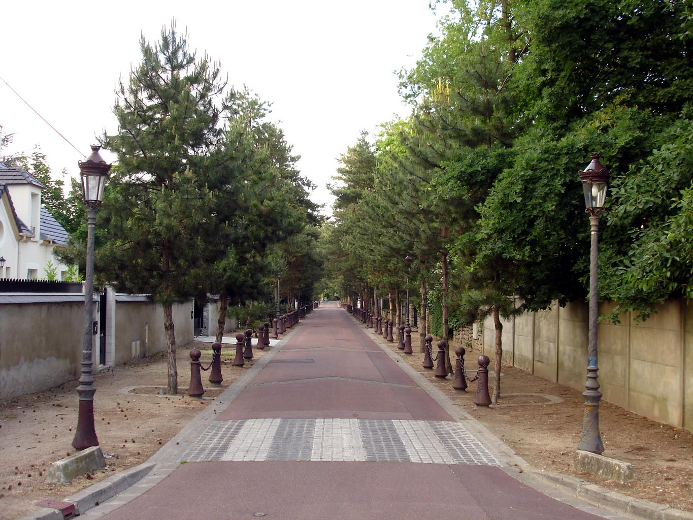 L'avenue des Sapins à Beauchamp (Val-d'Oise), France